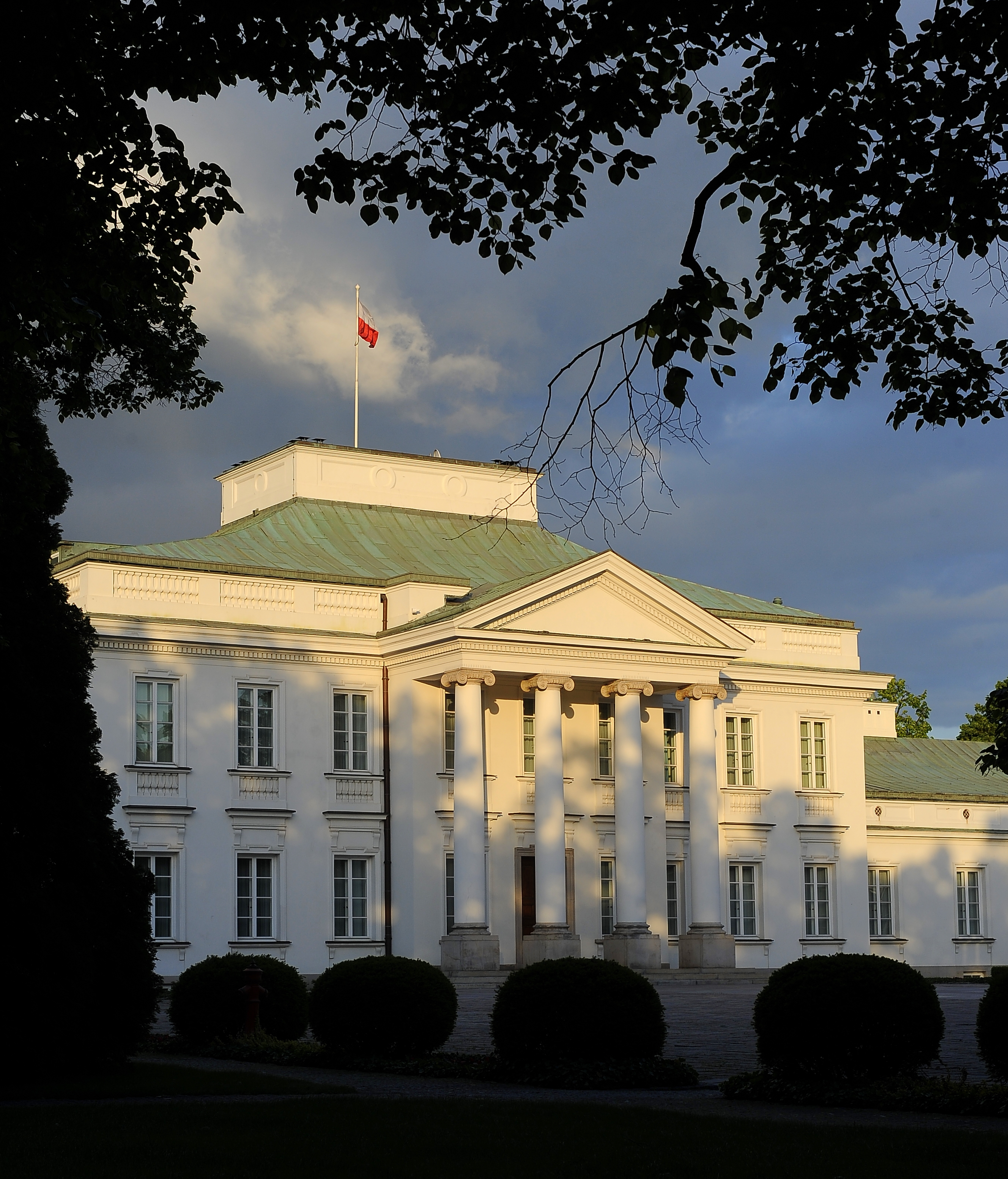 Belweder w Warszawie